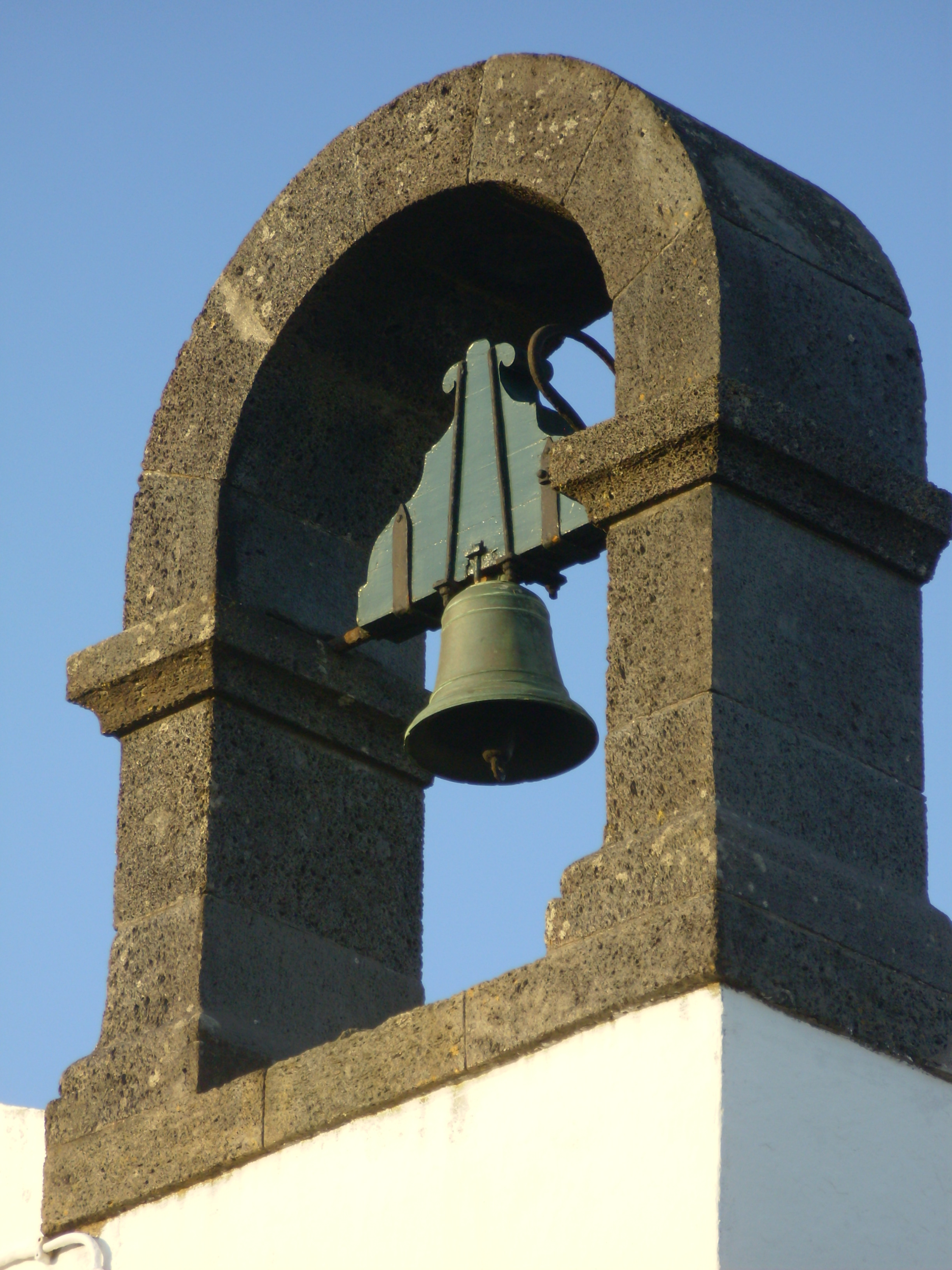 Capela de Santa Catarina, freguesia de São Pedro, concelho de Angra do Heroísmo, ilha Terceira, Região Autónoma dos Açores, Portugal.